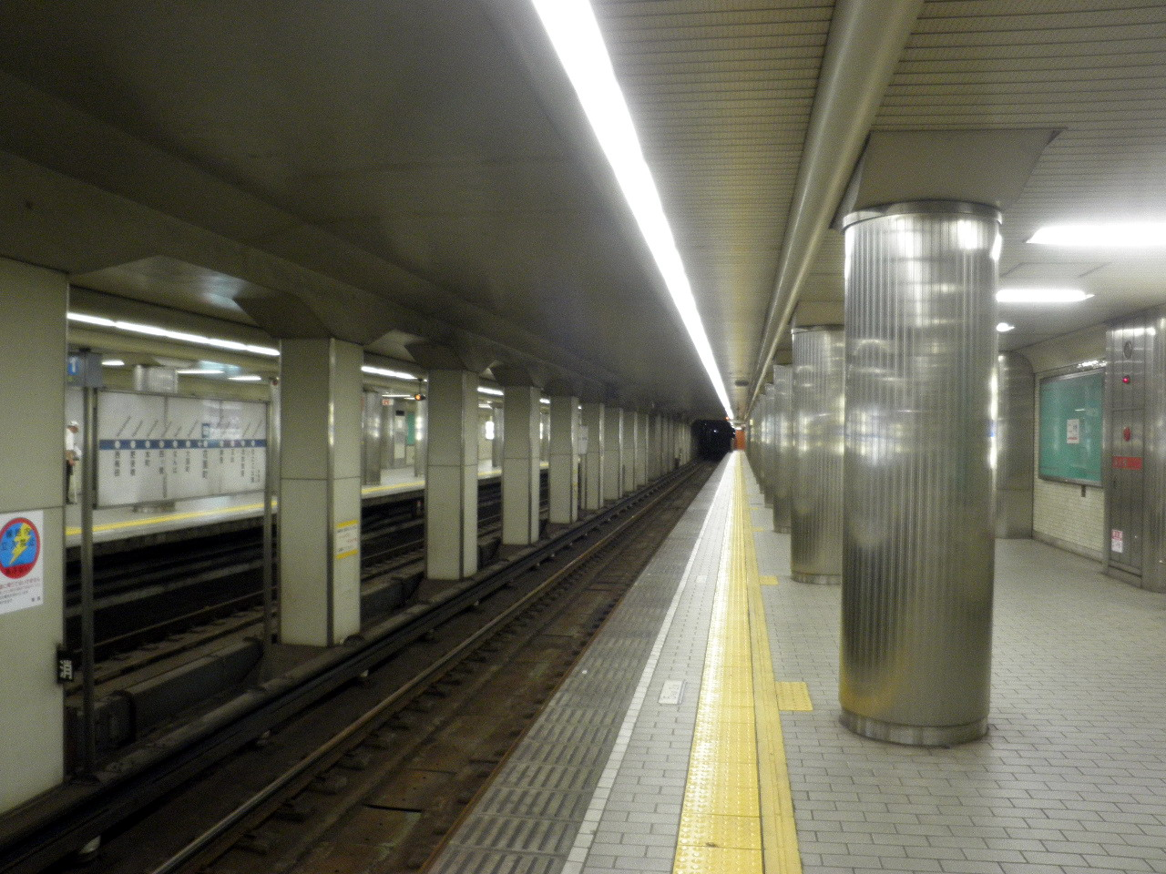 花園町駅ホーム